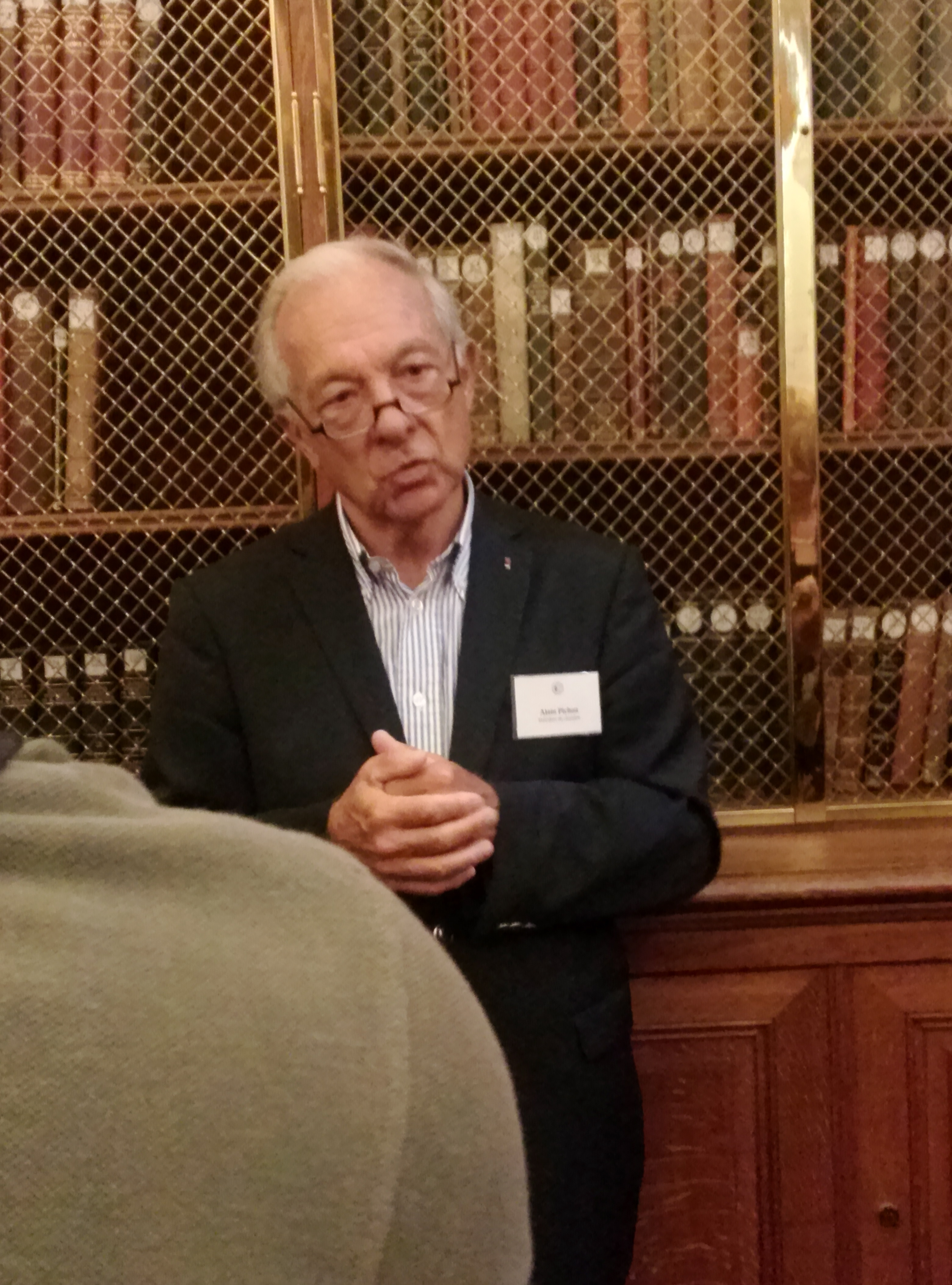 Alain Pichon en 2014, lors des journées du patrimoine à la cour des comptes.